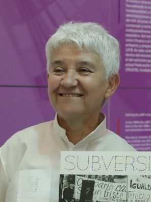 La planta 4ª del espacio cultural CentroCentro acoge desde hoy la exposición “Subversivas: 40 años de activismo LGTB”, que hace un recorrido histórico a través de nueve bloques temáticos con más de 200 piezas, originales y reproducciones. La delegada de Equidad, Derechos Sociales y Empleo, Marta Higueras, ha sido visitado la exposición señalando que “el Ayuntamiento de Madrid no es el protagonista de esta iniciativa, las protagonistas son las activistas, las subversivas de las que trata esta muestra”, y ha añadido que “todo el gobierno municipal nos sentimos absolutamente orgullosos de tener esta exposición en el Palacio de Cibeles”.